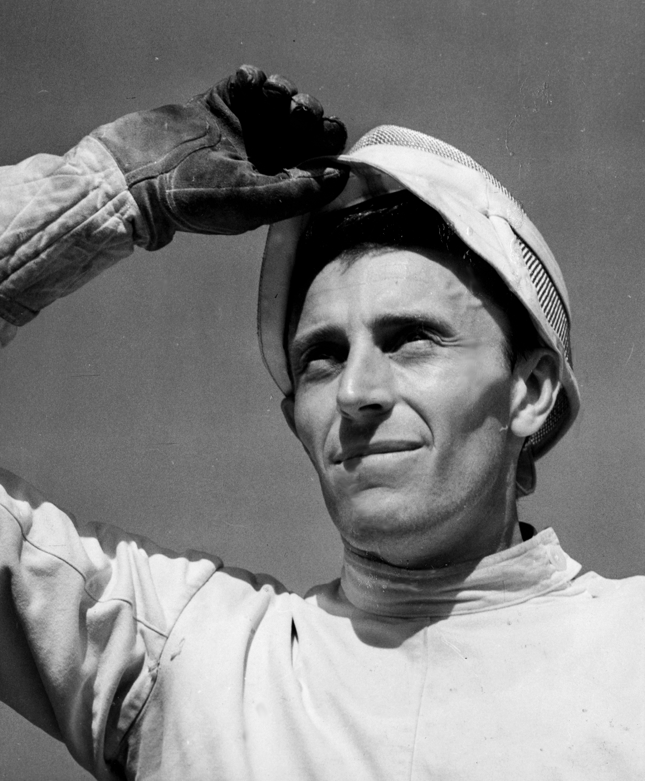 Pézsa Tibor (Esztergom, 1935. november 15. –) magyar vívó, olimpiai és világbajnok, minden idők egyik legsikeresebb magyar vívója, nyugállományú ezredes. Nevét viseli az esztergomi Prímás-szigeti sportcsarnok.